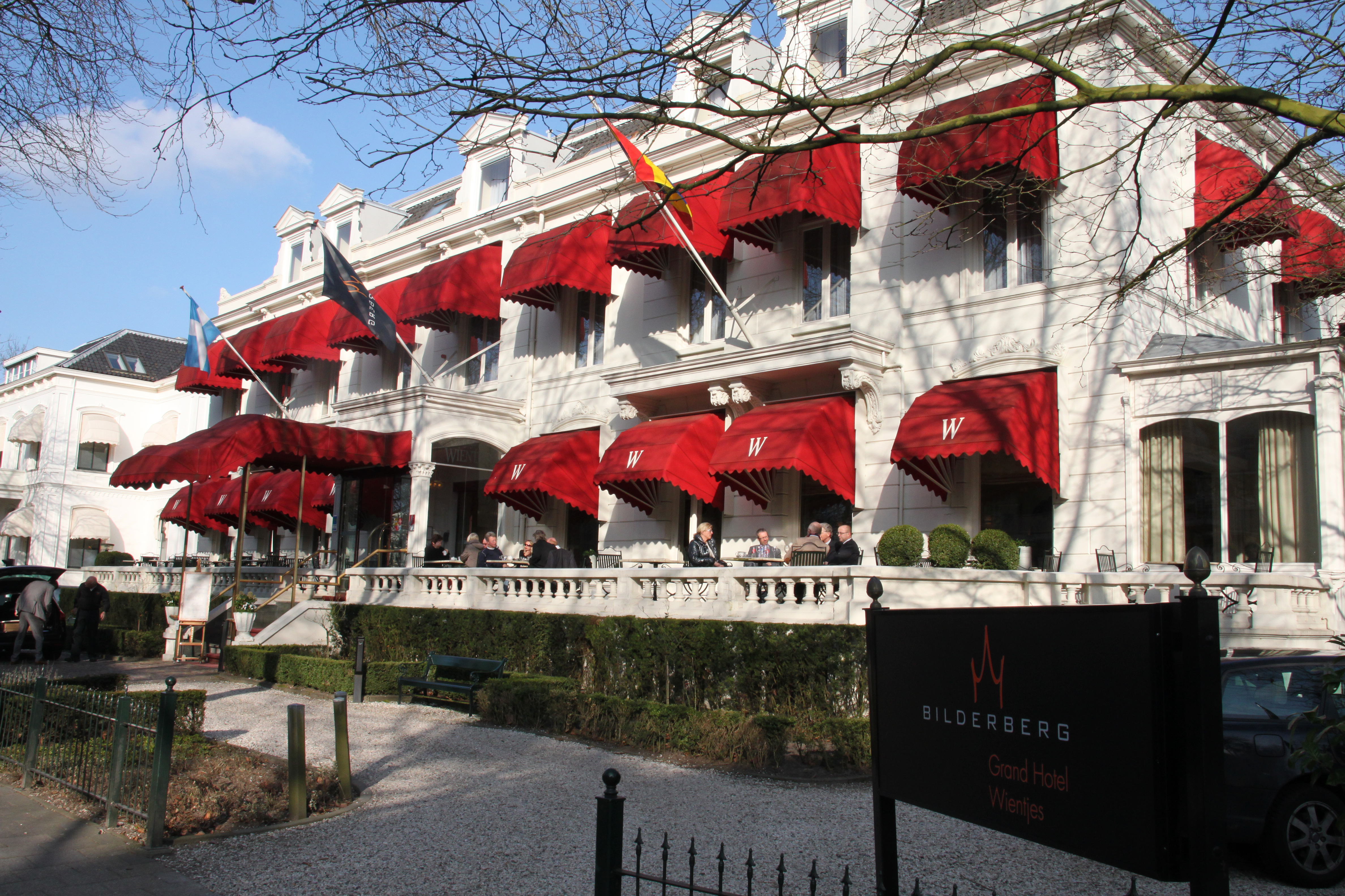 Hotel Wientjes van de Bilderberg groep in Zwolle.